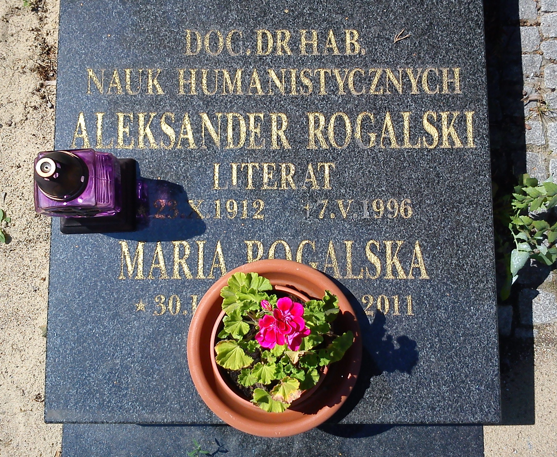 Grób Aleksandra Rogalskiego na cm. przy ul. Szczawnickiej w Poznaniu.